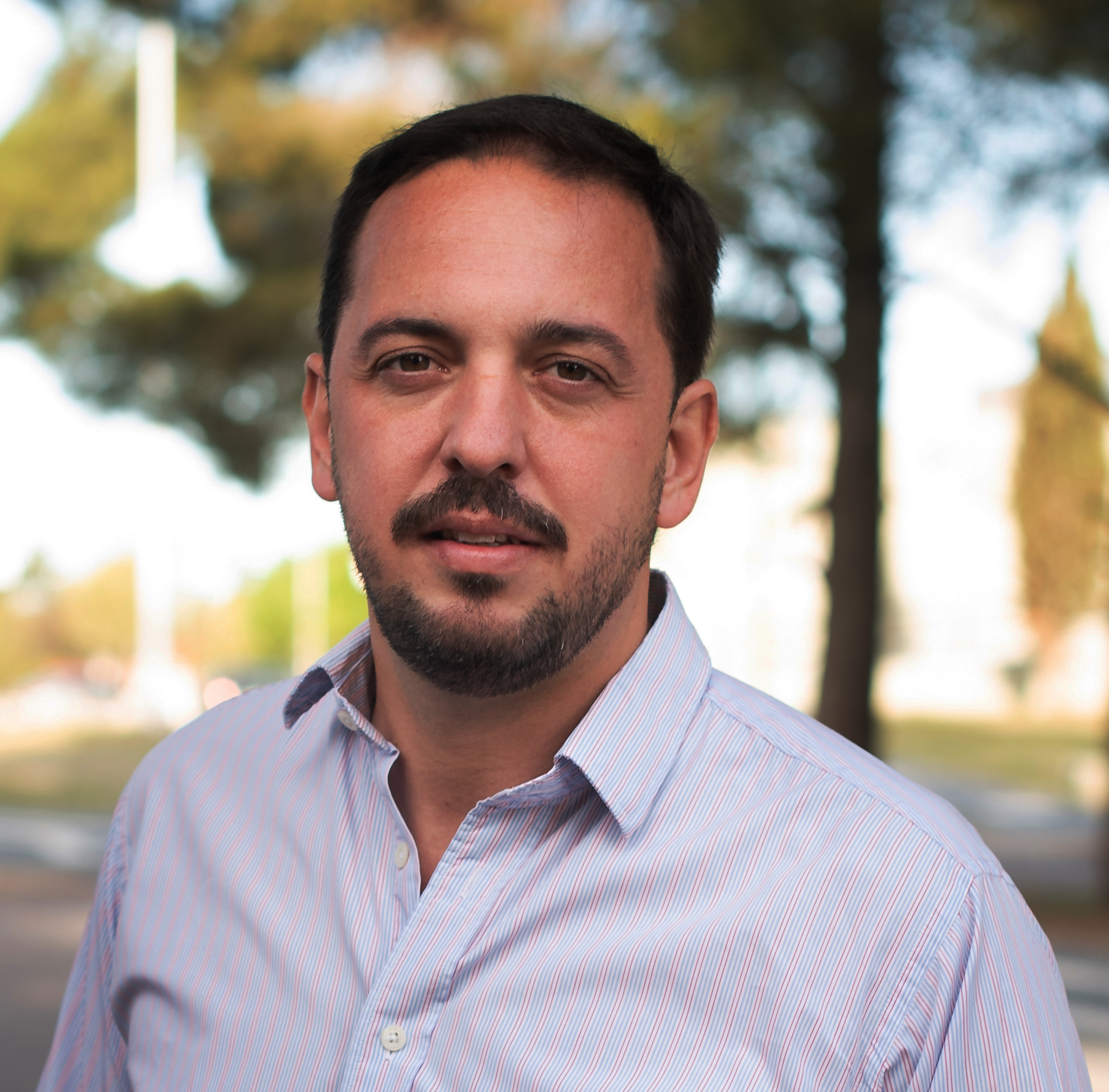 Luciano di Nápoli